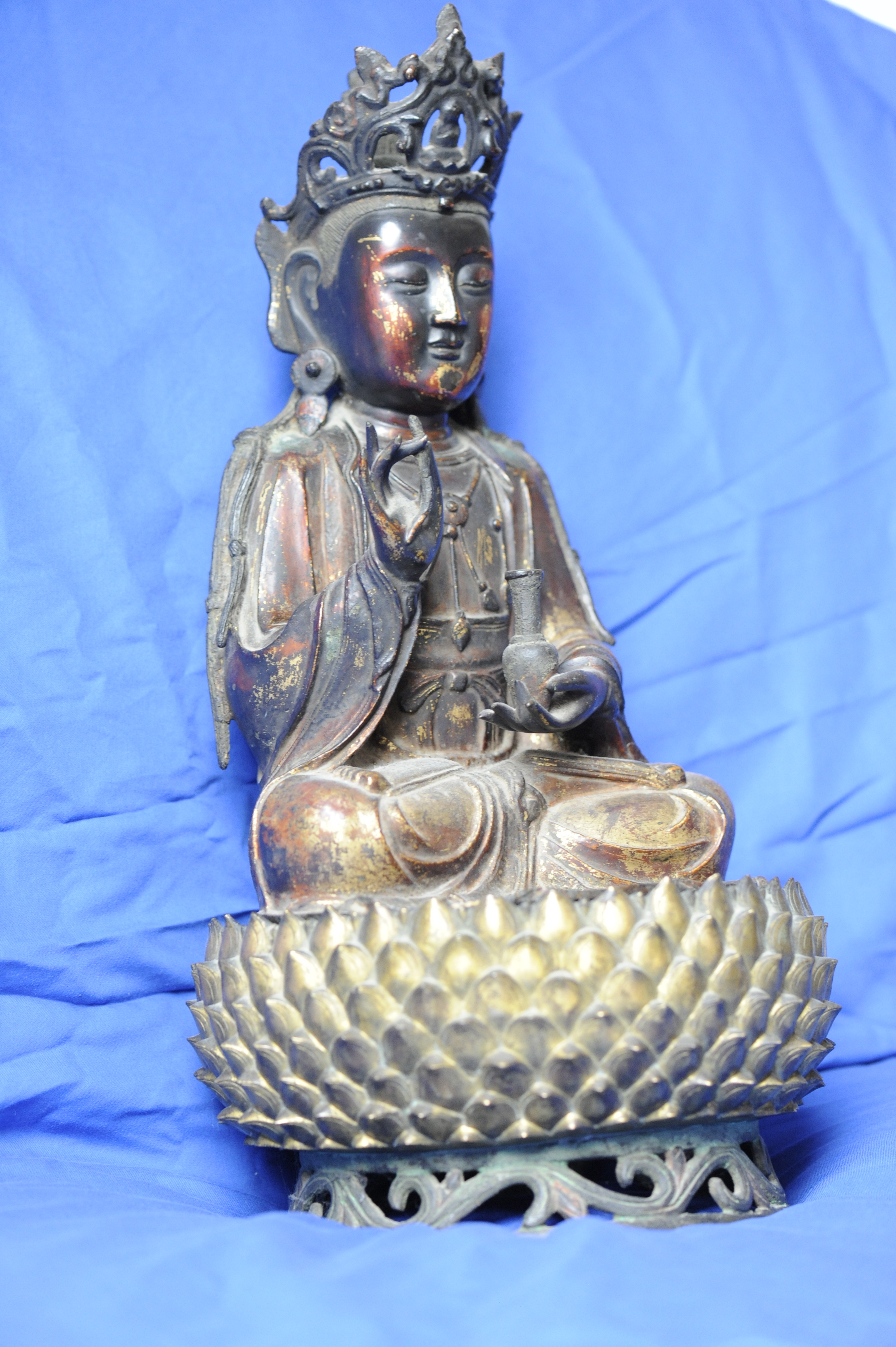 Chinesische Bronze, Ming Dynastie, Quan Yin